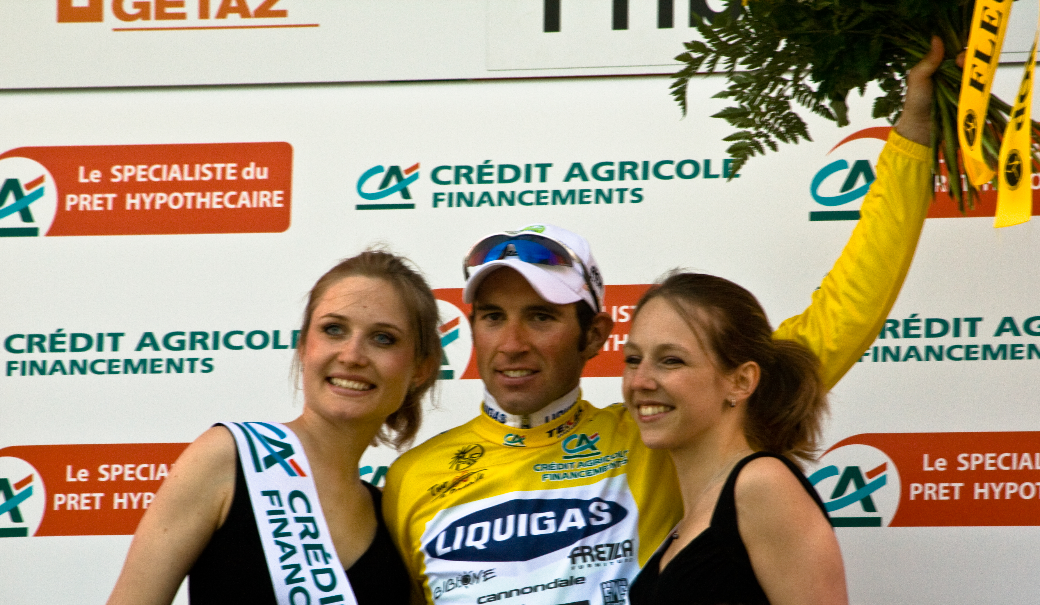 Michael Albasini leader du Tour de Romandie 2008 à Fribourg.